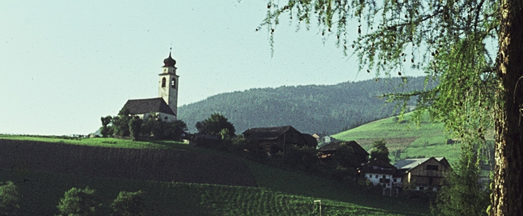 Curt in Mareo/Marebbe/Enneberg